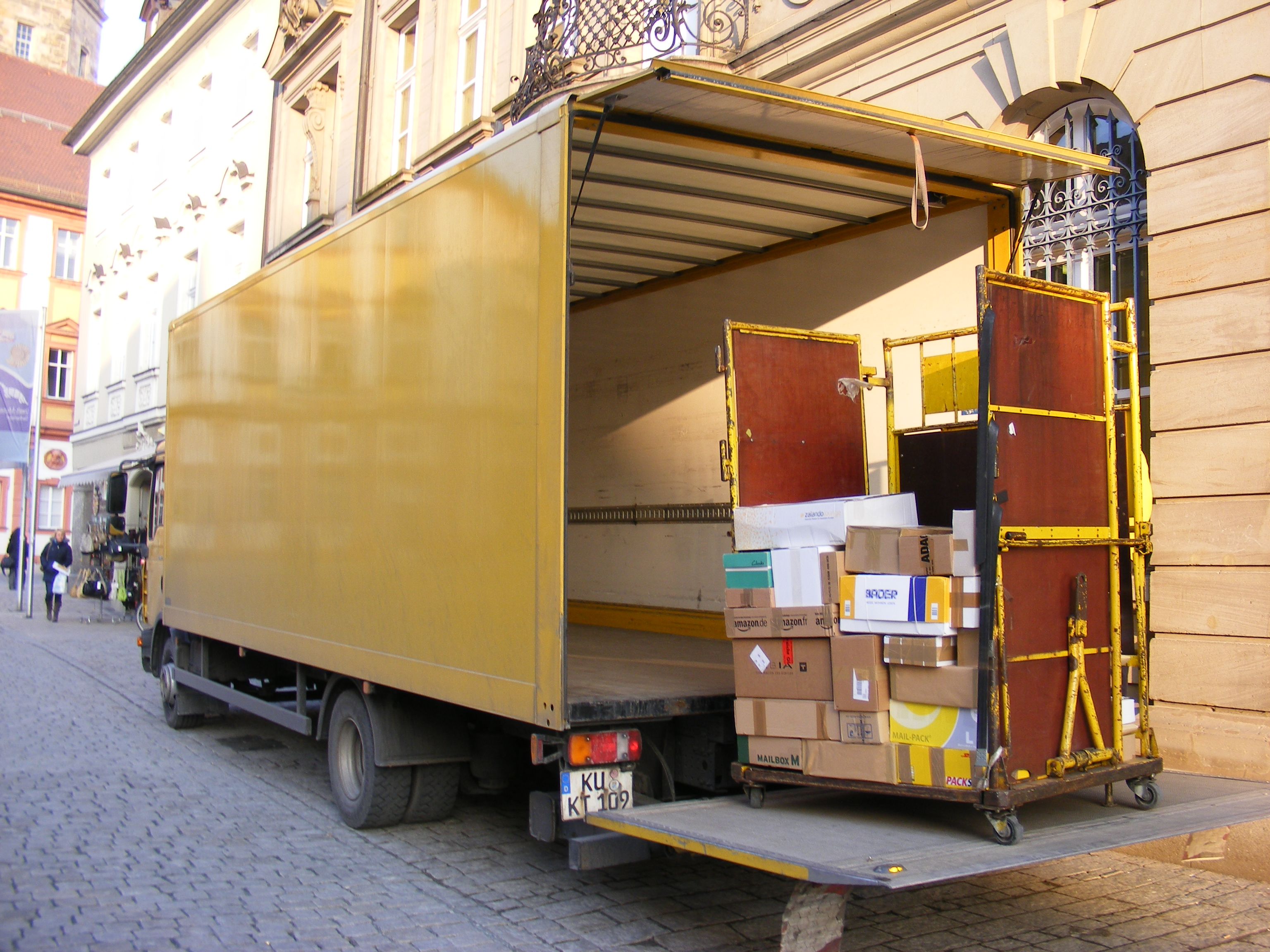 Bayreuth - Ausladen eines LKWs der Deutschen Post AG.